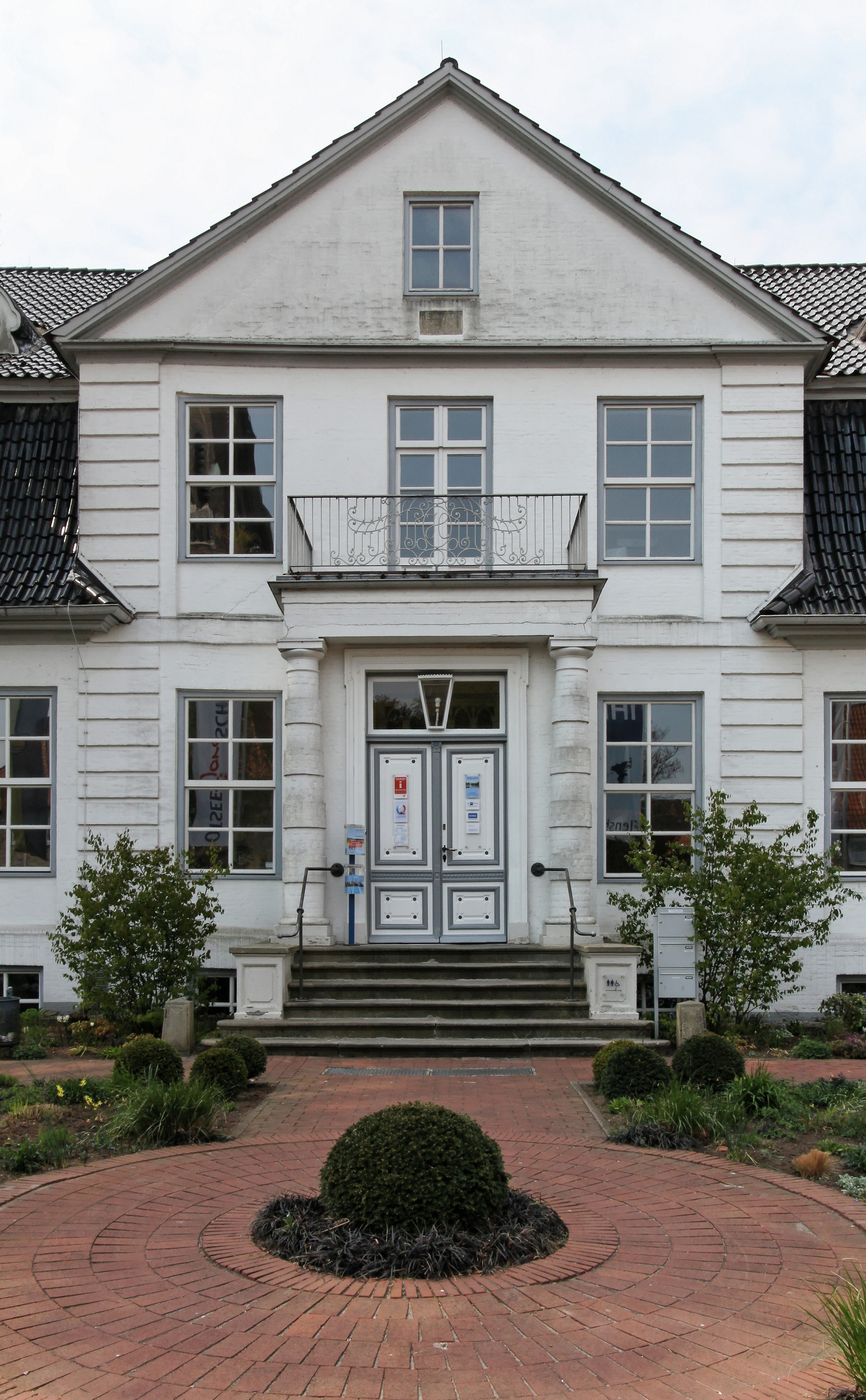 Schleswig, Plessenstr. 7